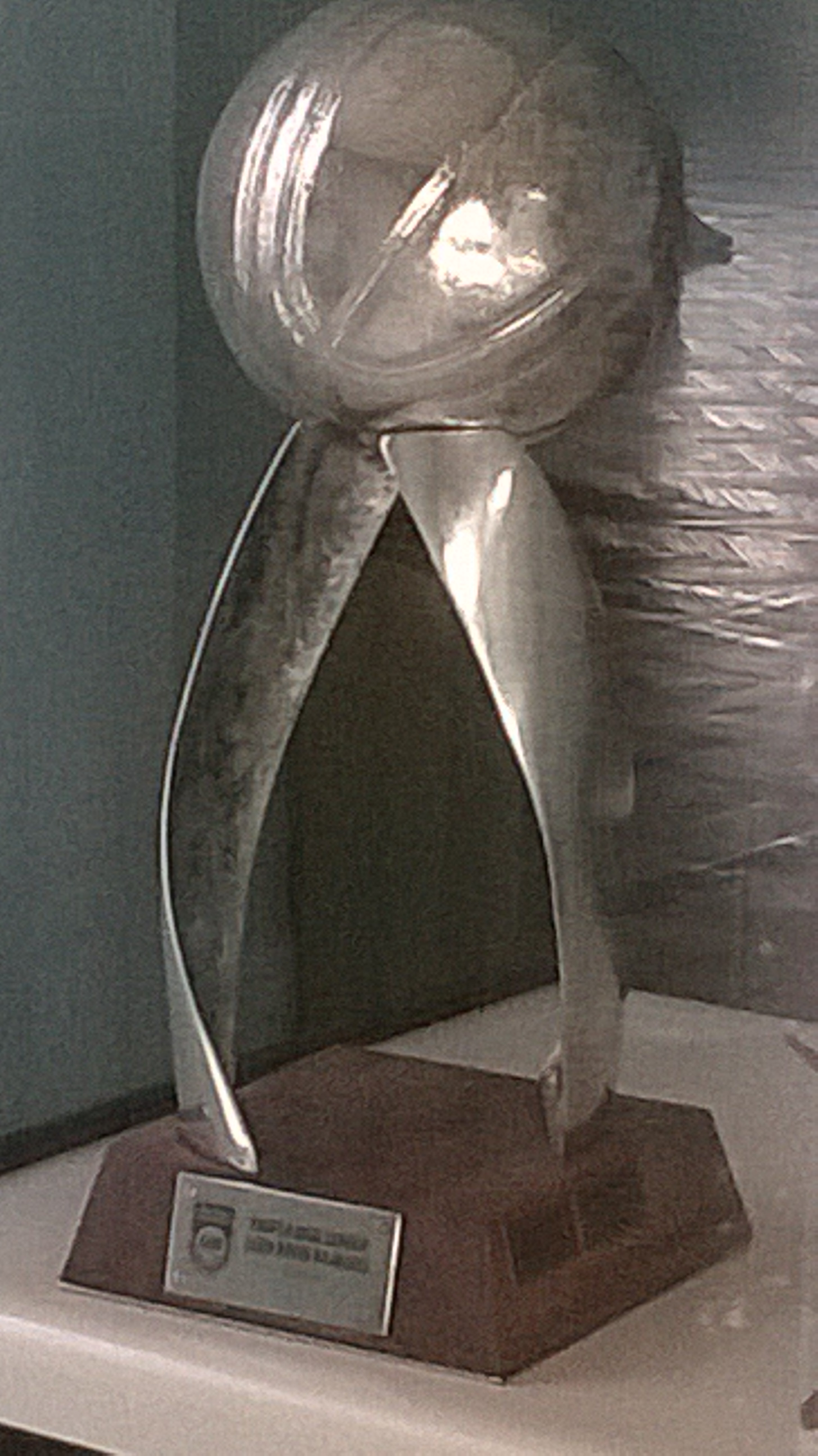 Foto del trofeo de la LNB 13/14 obtenido por el Club A Peñarol (Mar del Plata).